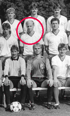 Title: Mannschaftsfoto FC Rot-Weiß Erfurt Factual corrections and alternative descriptions are encouraged separately from the original description. Additionally errors can be reported at this page to inform the Bundesarchiv. Original historic description: ADN-ZB-Hirndorf-10.8.89-ma-Erfurt: Fußball-Oberliga-Saison 1989-90. Die Mannschaft des FC Rot-Weiß Erfurt. Obere Reihe von links: Heiko Räthe, Carsten Sänger, Holger Bühner, Ronald Baumbach, Uwe Abel, Wolfgang Döring und Frank Holick. Mittlere Reihe von links: Trainer Wilfried Gröbner, Oliver Merkel, Uwe Weidemann, Mario Dappe, Thomas Linke, Frank Dünger, Andreas Hintke, Gerd Seifert und Trainerassistent Dieter Göbel. Vorn von links: Holger Demme, Steffen Dünger, Gerd Sachs, Rainer Hoffmeister, Steffen Kraus, Jürgen Heun und Armin Romstedt.